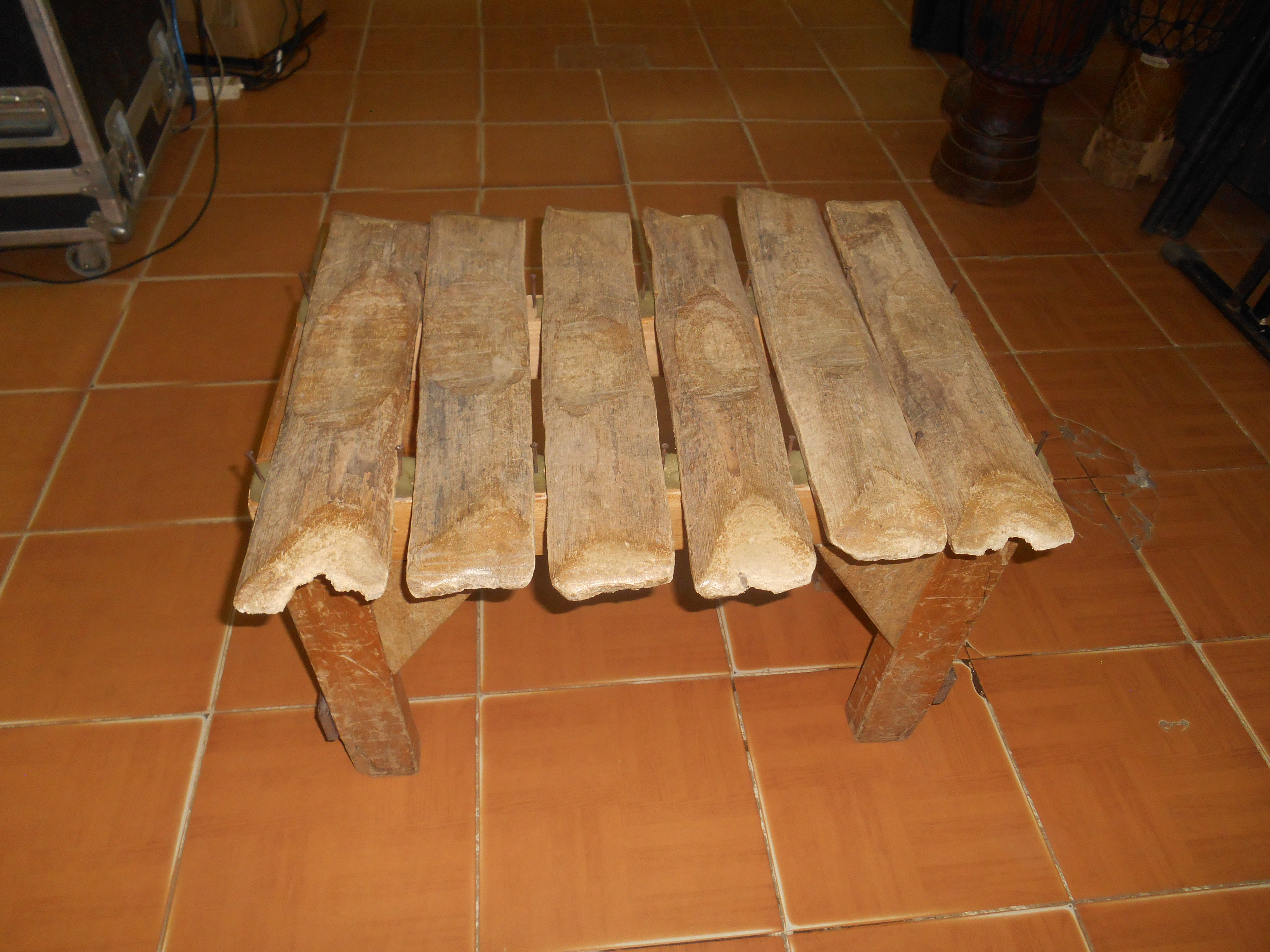 Le Djomolo est un instrument de musique qui se joue à deux ! Le plus souvent les joueurs se font face pour jouer en canon. Au départ, utilisé dans les champs comme épouvantail pour faire fuir les oiseaux et les singes, on le retrouvait également dans les cabarets pour se divertir le soir après de durs travaux champêtres. This is an image from Ivory Coast